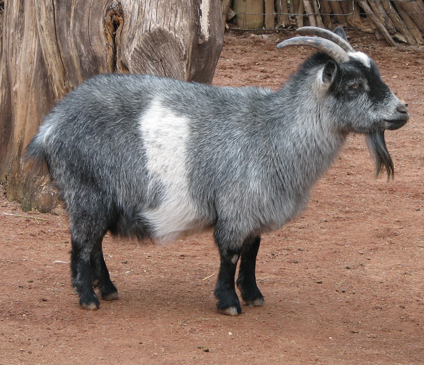 Nigerian Dwarf Goat